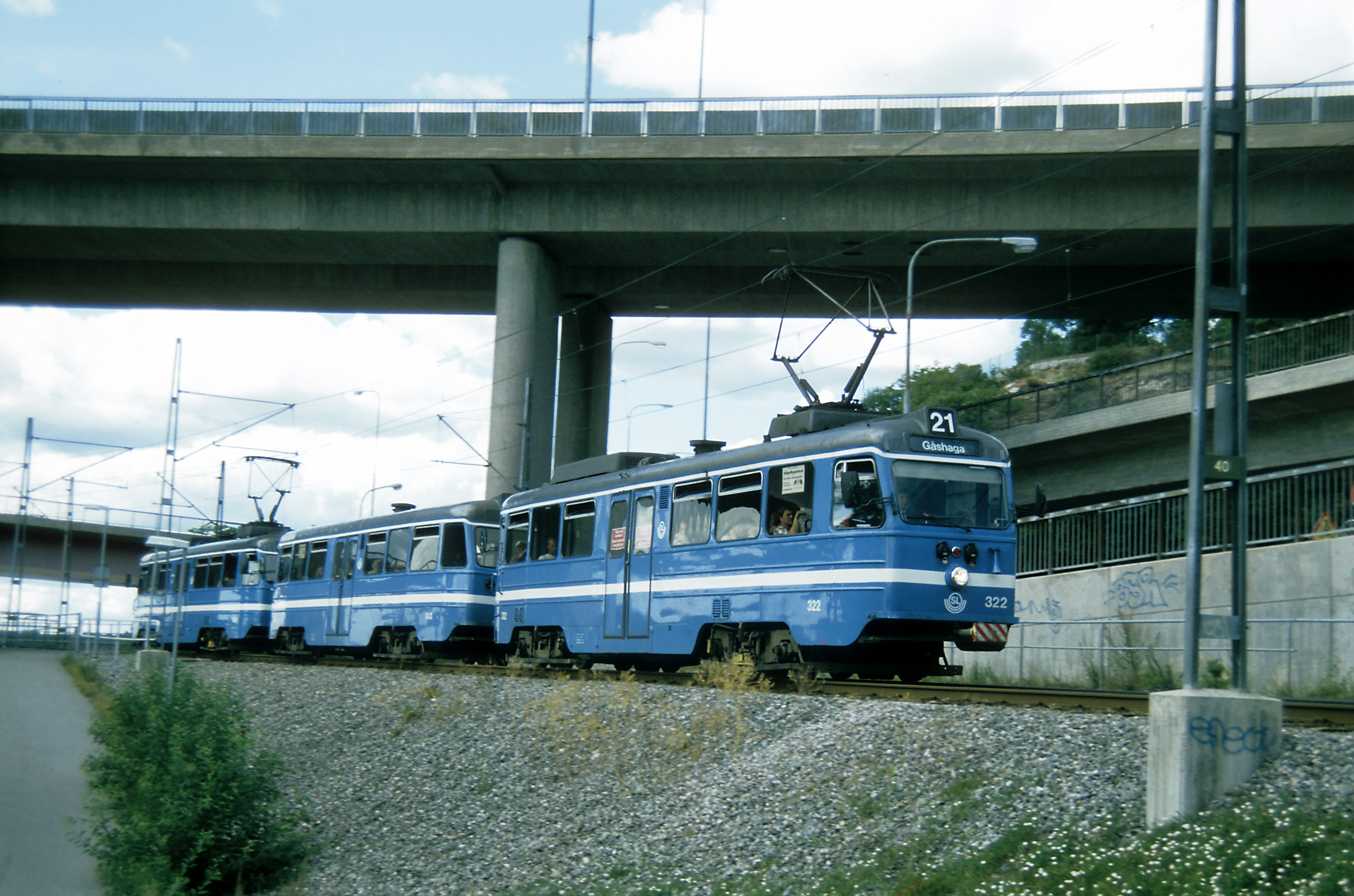 Dreiwagenzug nach Verlassen der Lidingöbrücke